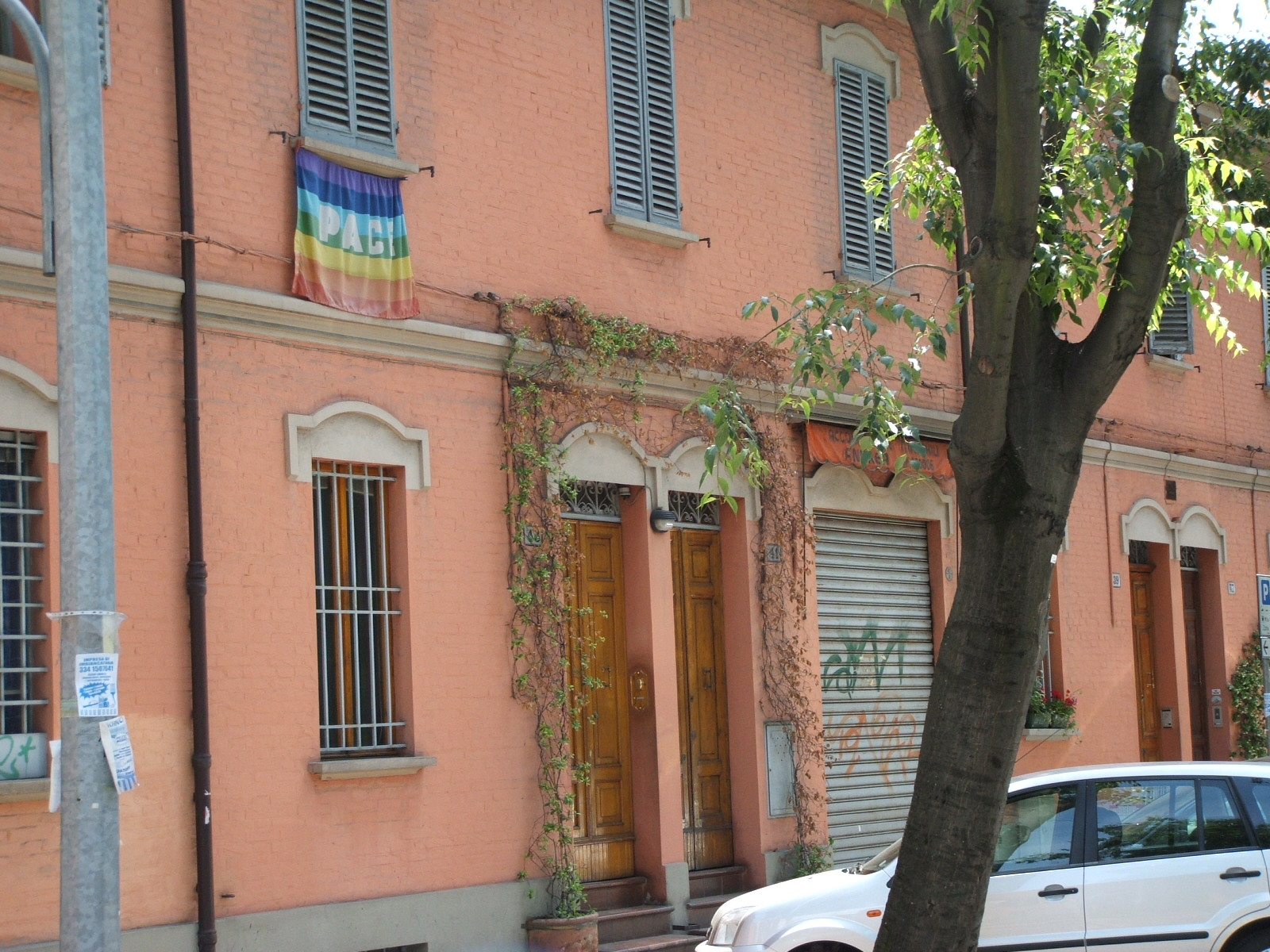 Dal wikiraduno di Bologna, maggio 2006 Bologna, Via Paolo Fabbri 43